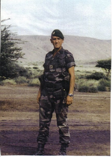 Legione straniera, il brigadier chef Danilo Pagliaro effettivo della Legione straniera.